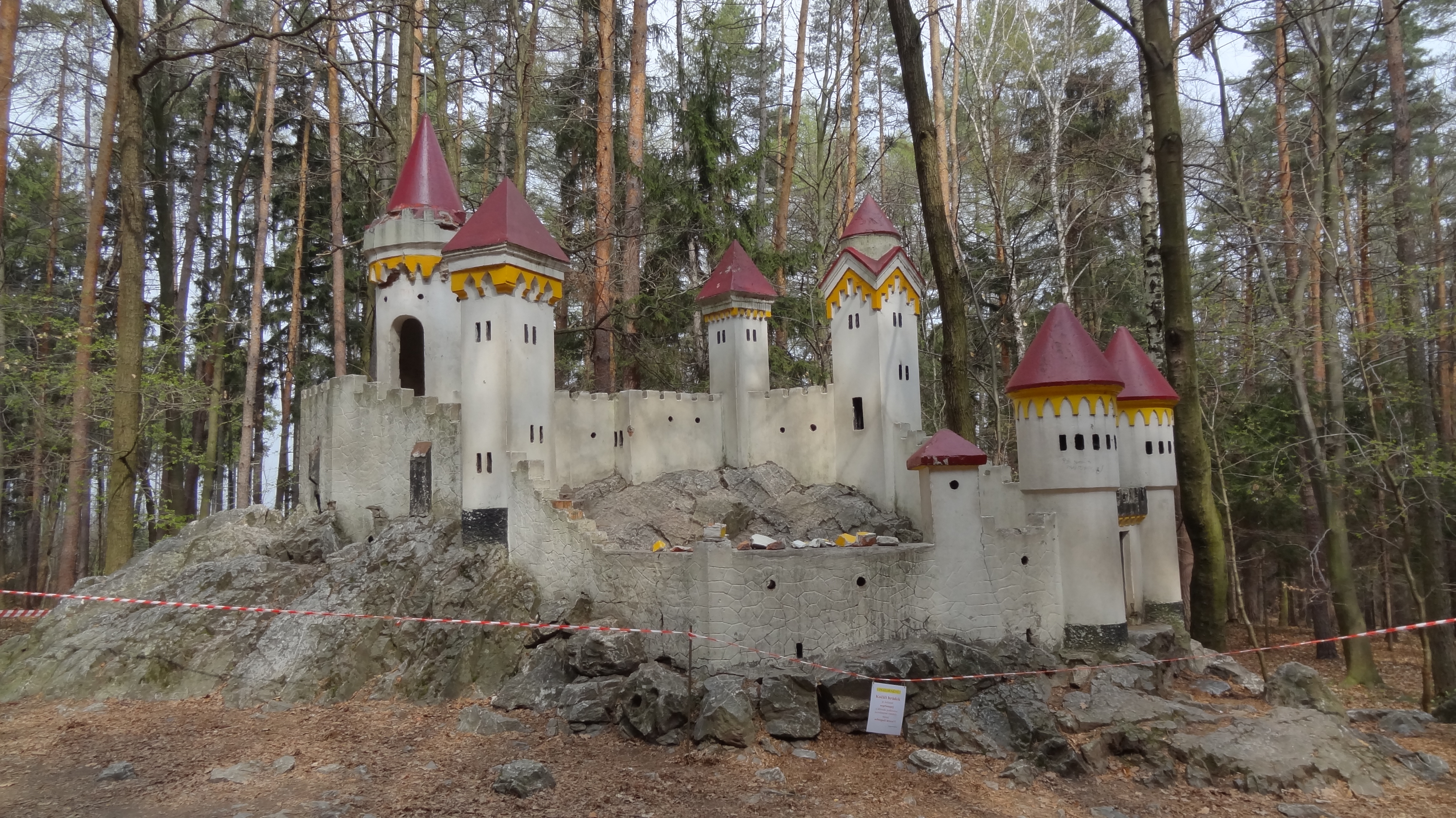 Slatiňany